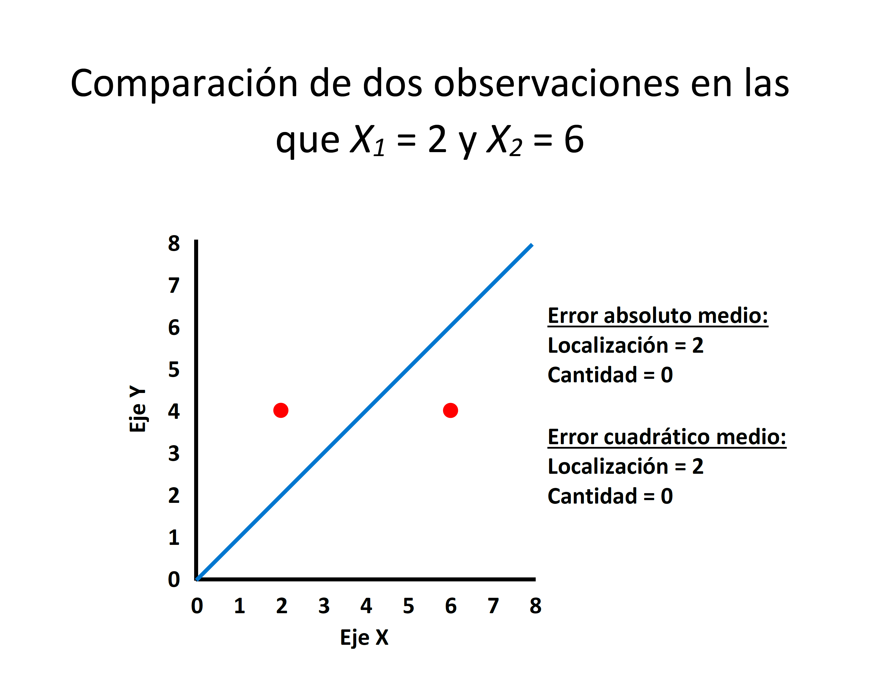 Comparación del error absoluto medio y del error cuadrático medio para un caso sencillo